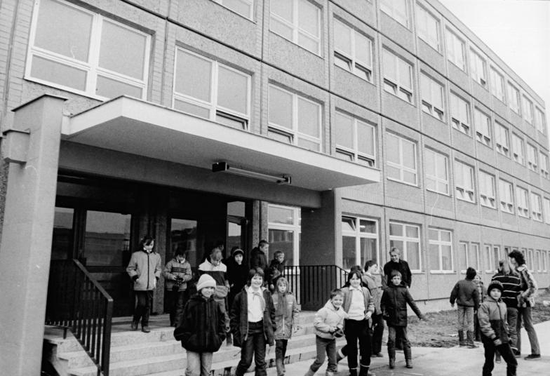 Berlin, Marzahn, Polytechnische Oberschule 56, Eingang ADN-ZB Zimmermann 27.2.84 Berlin: Schule neuen Typs übergeben- Als 40. Neubauschule im Stadtbezirk Marzahn wurde die 56. POS Parsteiner Ring 24 ihrer Bestimmung übergeben. Sie ist die erste in Berlin, die anstelle der Skelett- in der Großtafelbauweise errichtet wurde. Information added by Wikimedia users.